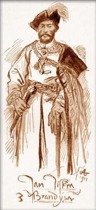 Mikoláš Aleš - Jan Jiskra z Brandýsa